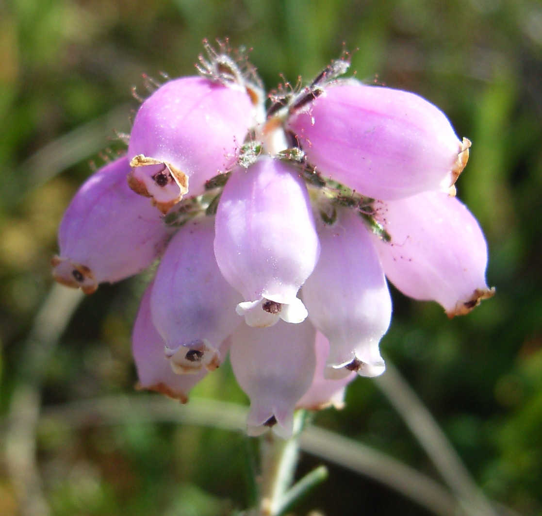 Blütenstand der Glocken-Heide (Erica tetralix), Nordwestdeutschland